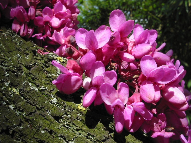 Cercis siliquastrum, Jardin des Plantes de Paris